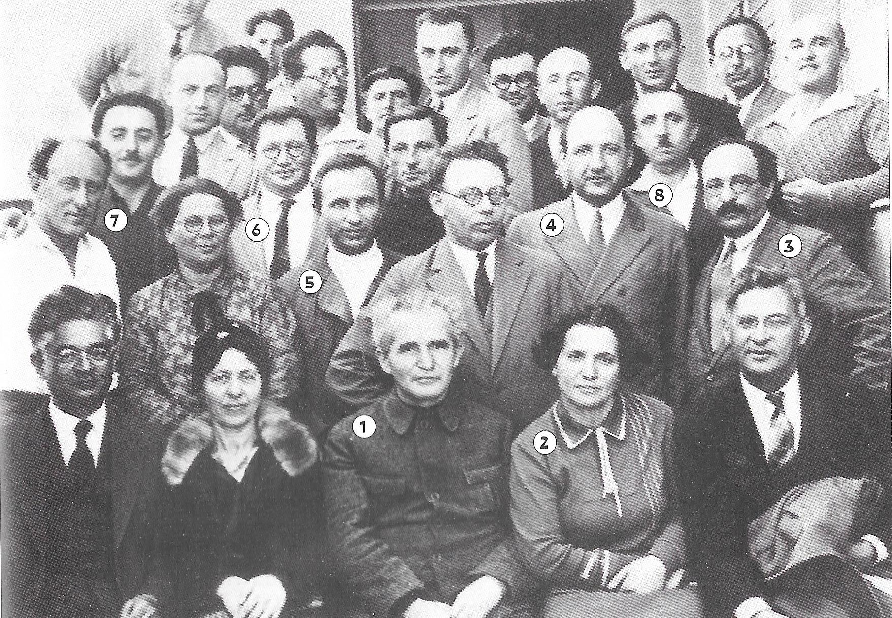 צילום קבוצתי לרגל הופעת עיתון דבר, 1 דוד בן גוריון, 2 פולה בן גוריון, 3 זלמן שז"ר, 4 אליעזר קפלן, 5 אליהו גולומב, 6 דוד זכאי, 7 משה שרת 8 גורפינקל, 1925.